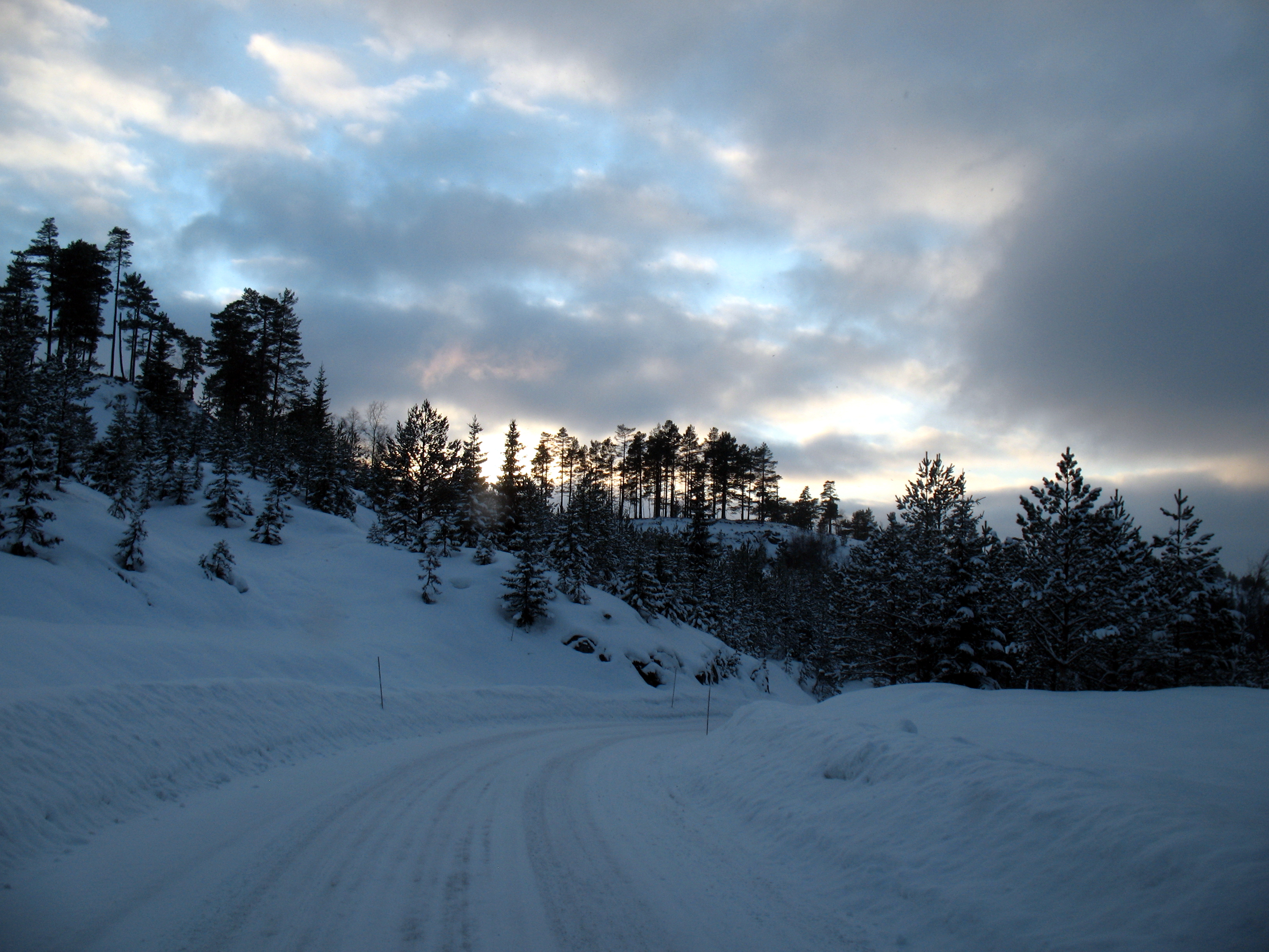 Fylkesvei 66 i Vest-Agder går mellom Graslia i Vennesla over Erkleiv til fylkesgrensen ved Grua. Veien er 8,6 km lang.